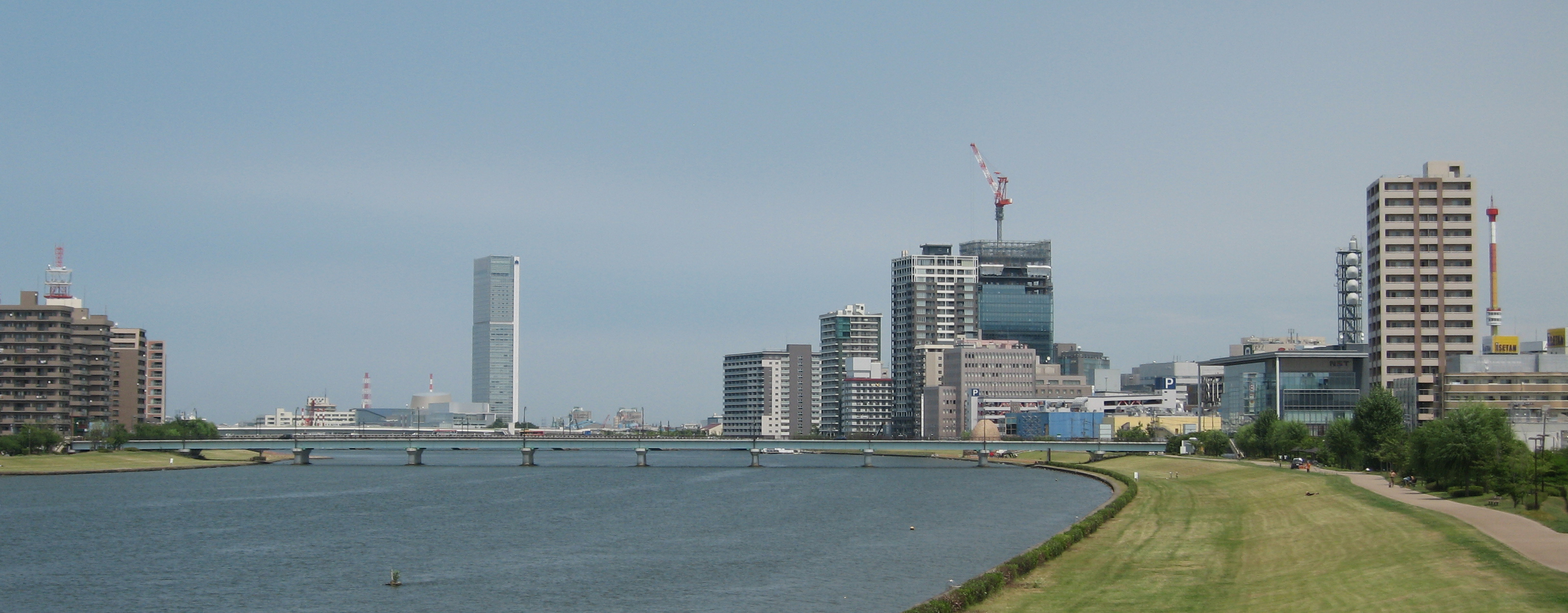 新潟県新潟市中央区。昭和大橋から見た、万代方面の景観。